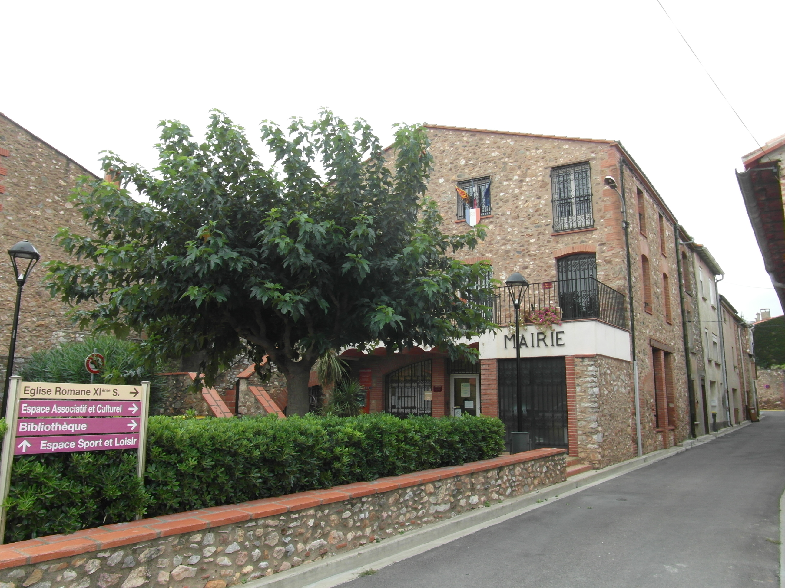 Mairie de Llupia